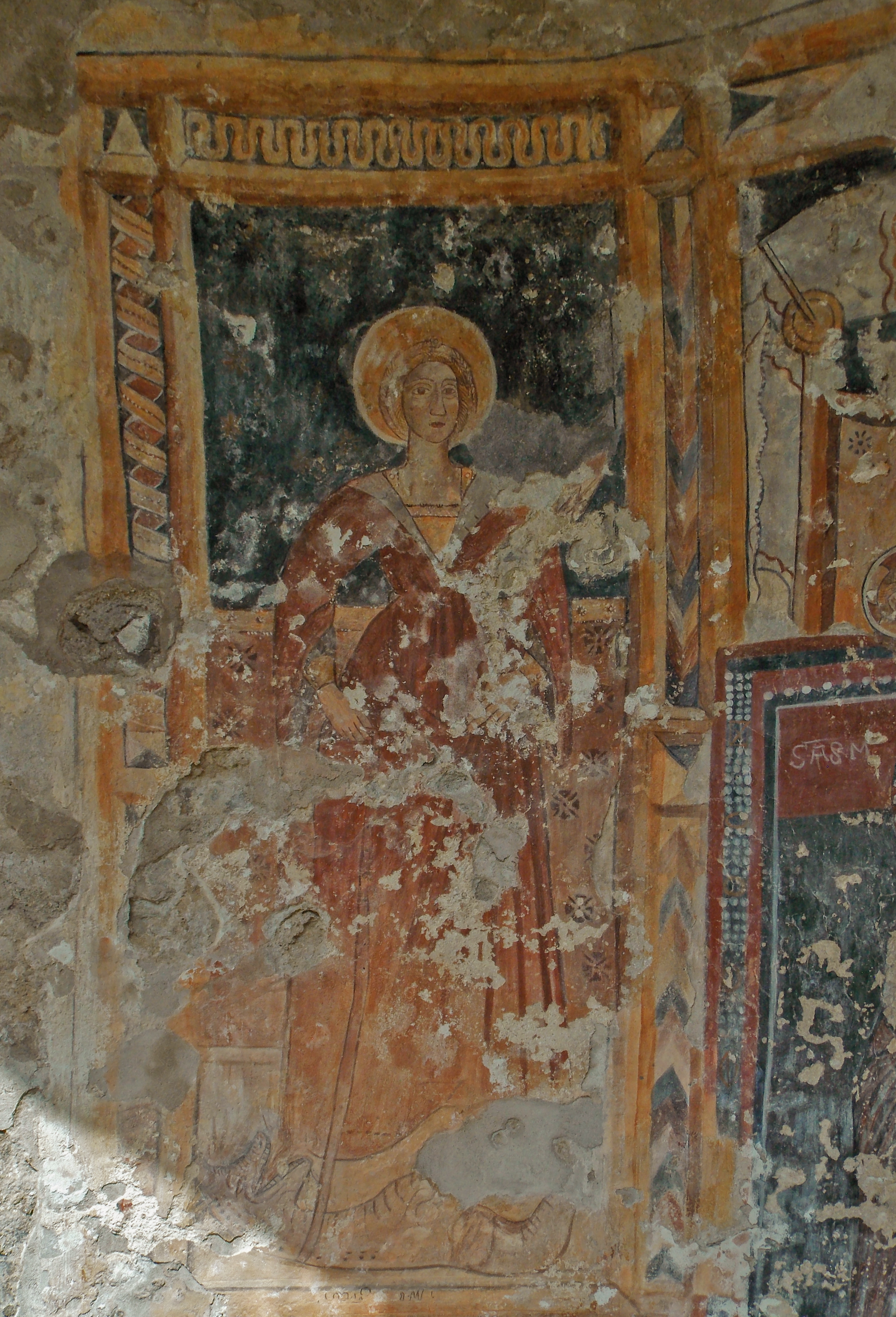 I ruderi dell'abside dell'oratorio di San Giorgio a Faicchio (BN) con gli affreschi, dipinti fra il X e il XV secolo